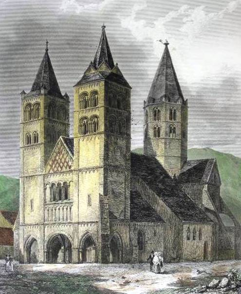 Gravure de l'église Saint-Léger de Guebwiller, datant de 1836.